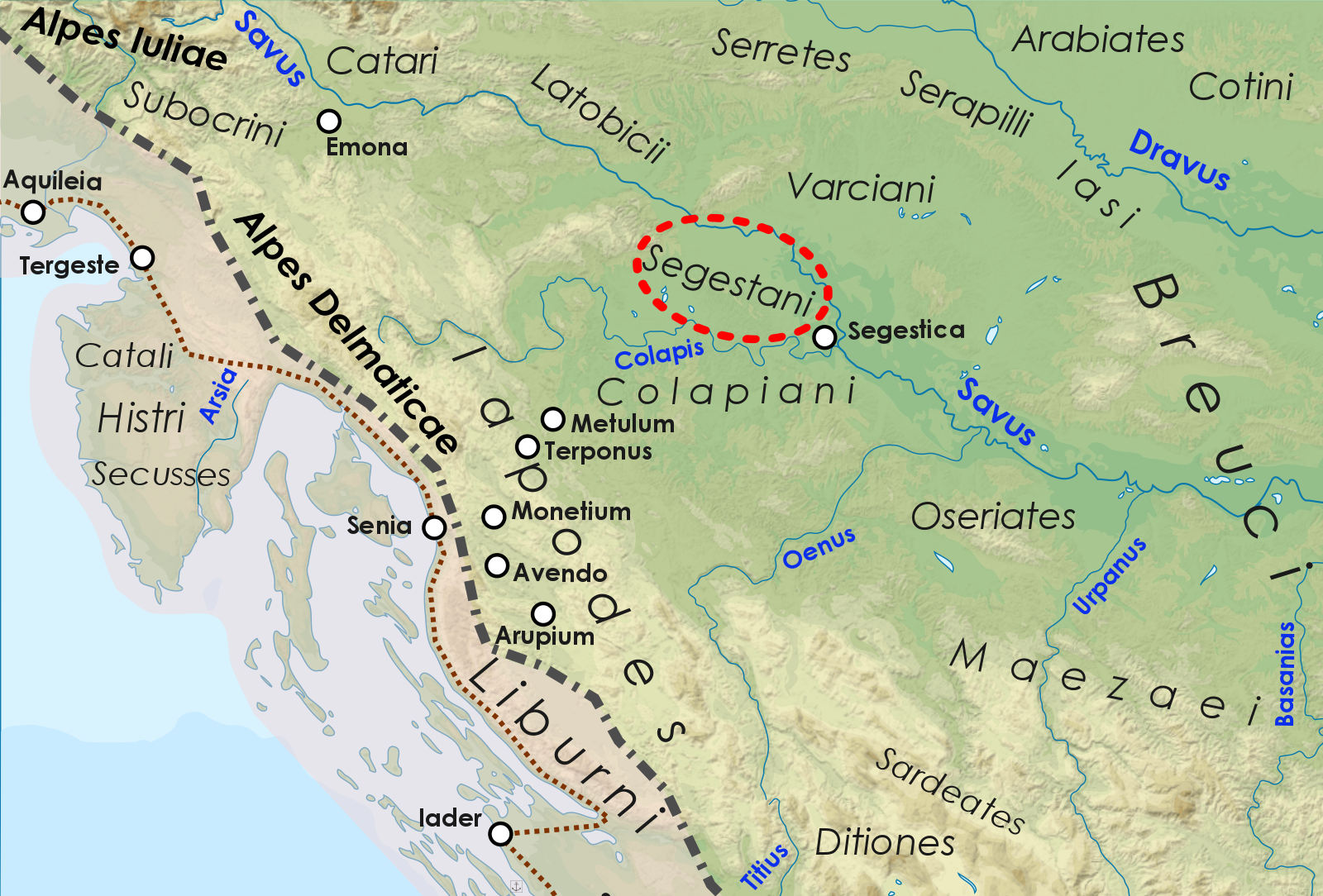 La popolazione pannonica dei Segestani (40 a.C.)